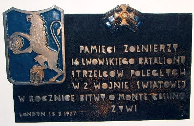 Tablica w kościele św. Andrzeja Boboli w Londynie